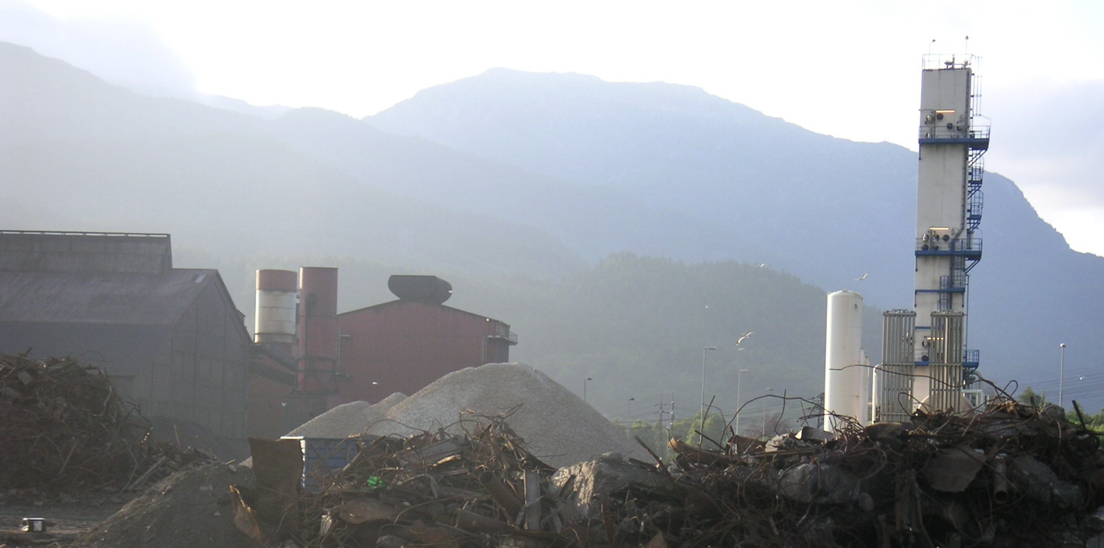 Bildet er tatt på området Sauda Næringspark Fotograf: Brukeren neitakk